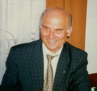 Ryszard Kapuściński (1932-2007), Polish writer and journalist